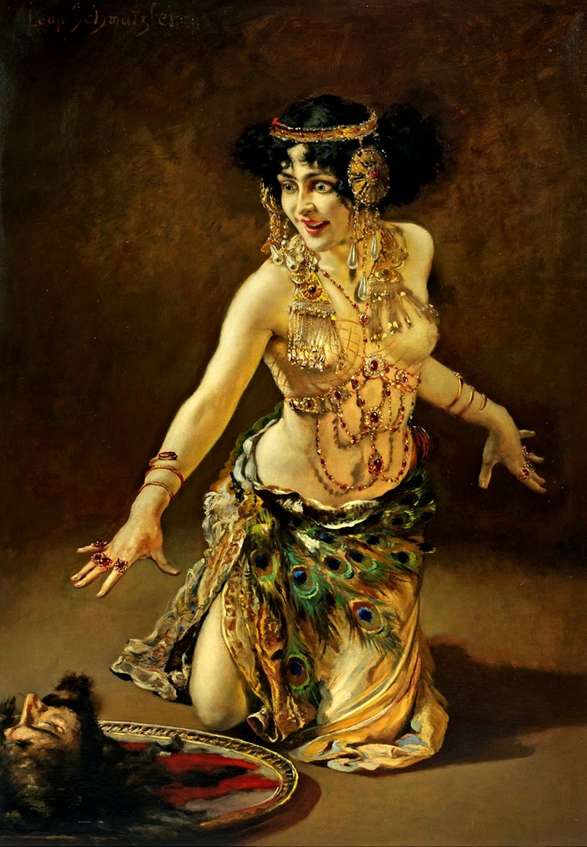 Depicted person: Lili Marberg, (1876-1962) / Porträt in Kostüm in der Rolle der Salomé, knieend